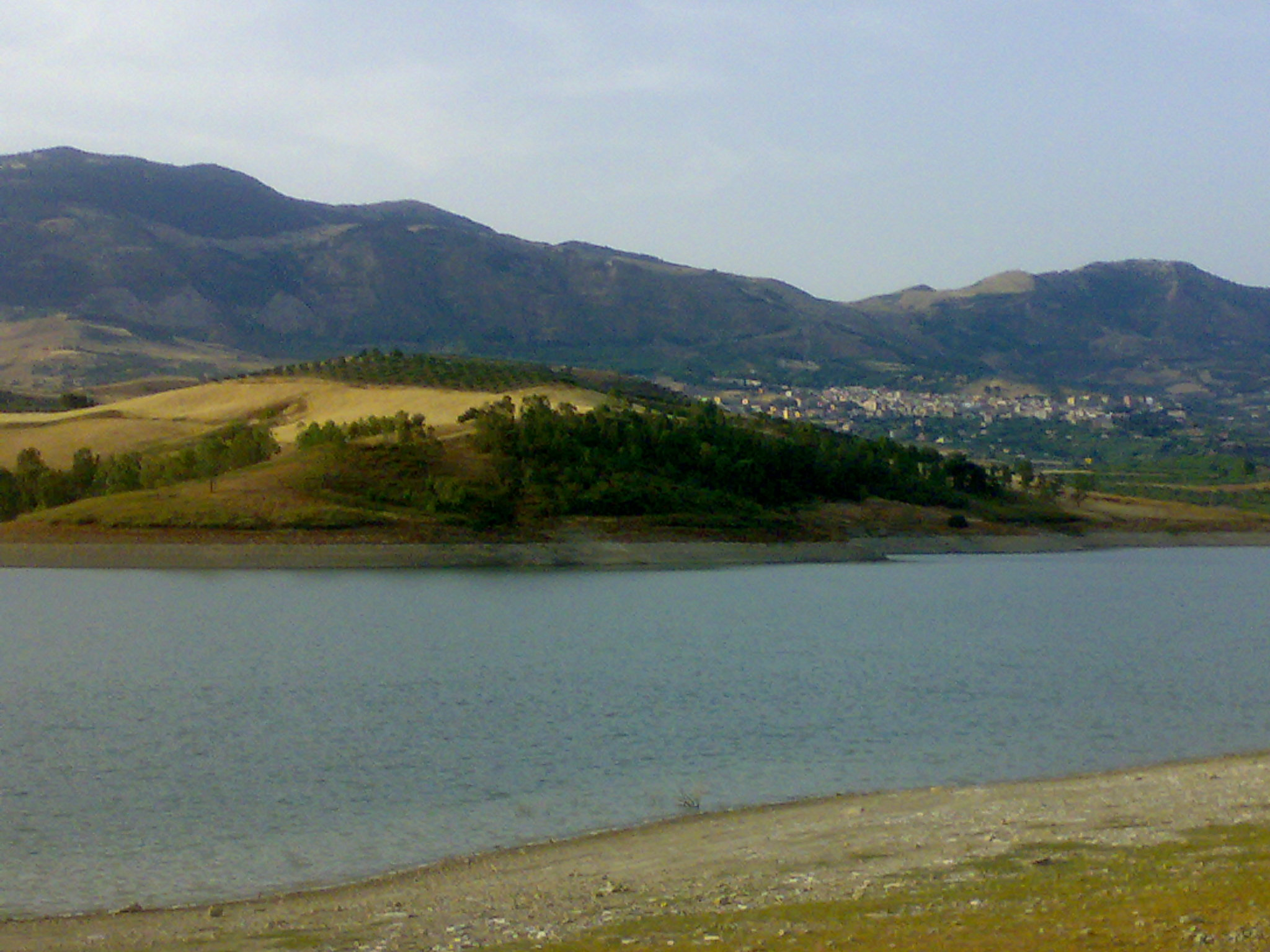 Panorama di Bivona dalla Diga Castello